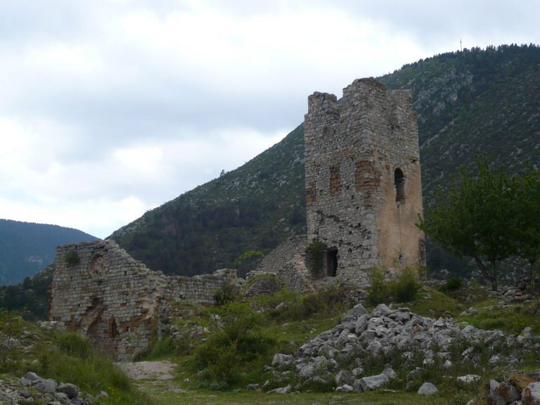 Santa_Maria_del_castell_de_Gósol, , Catalunya